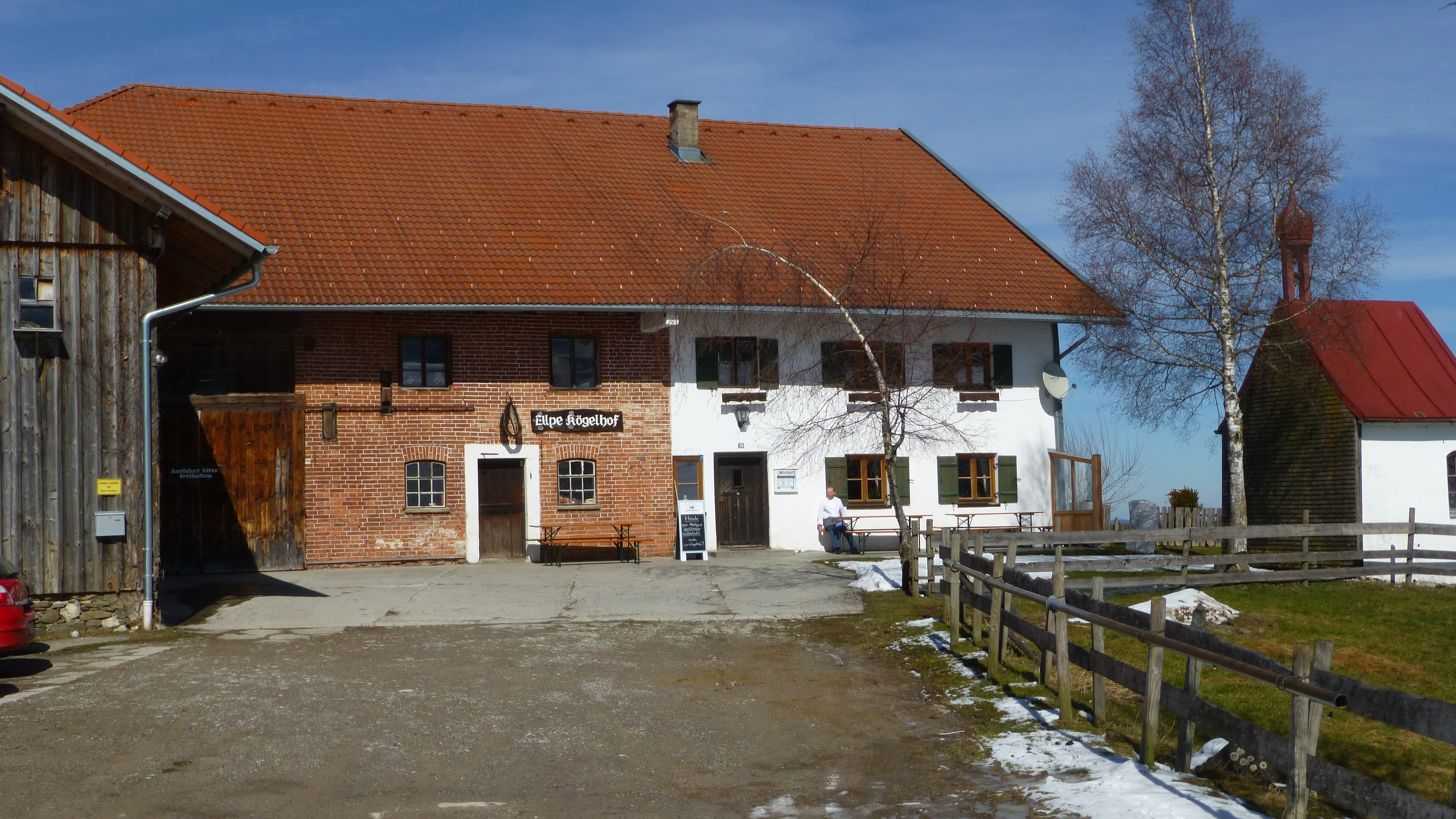 Alpe Kögelhof in der Gemeinde Eisenberg, Ostallgäu